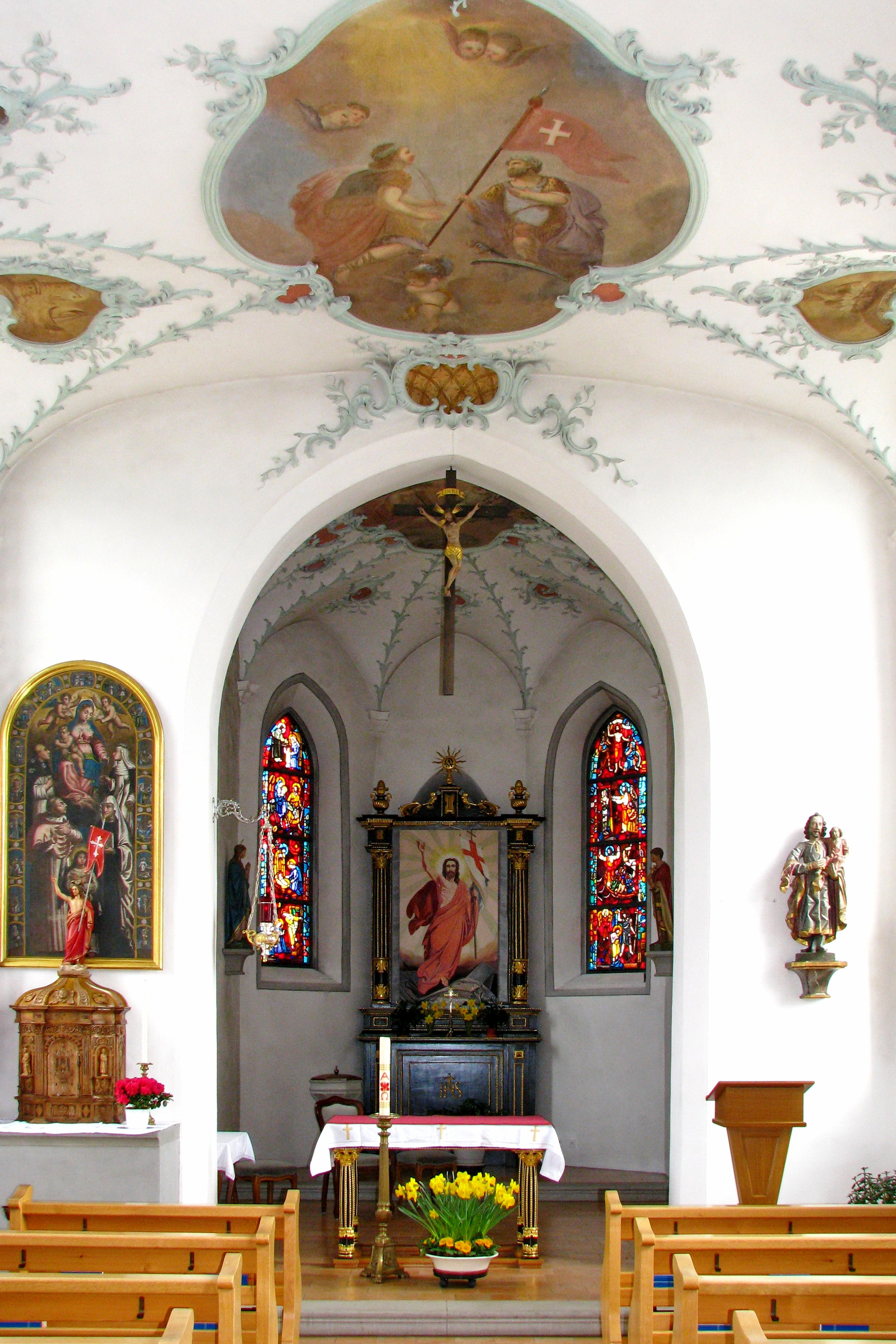 Pfarrkirche St. Pankratius in Bollingen on Obersee (upper Lake Zürich) shore